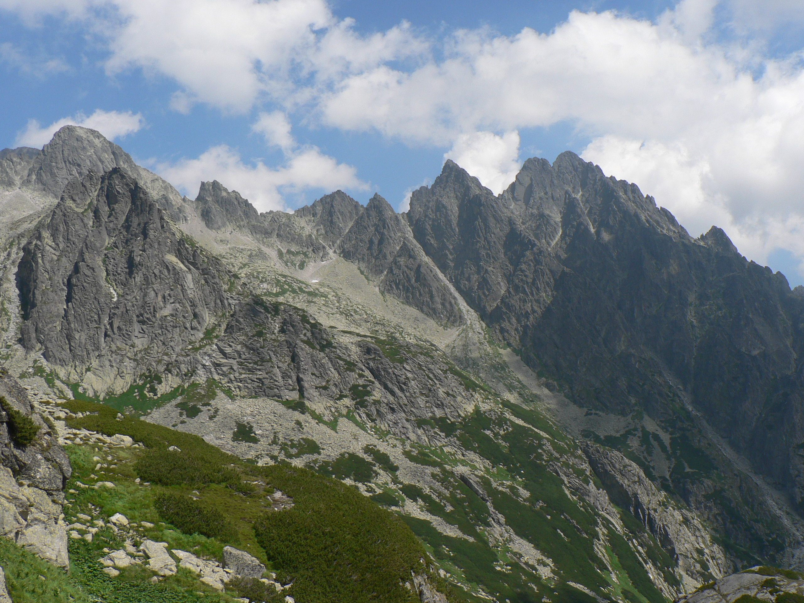 Otoczenie Doliny Staroleśnej: Mały Lodowy Szczyt, Czerwona Ławka, Spąga, Sokola Turnia, Drobna Turnia, Żółty Szczyt i Pośrednia Grań